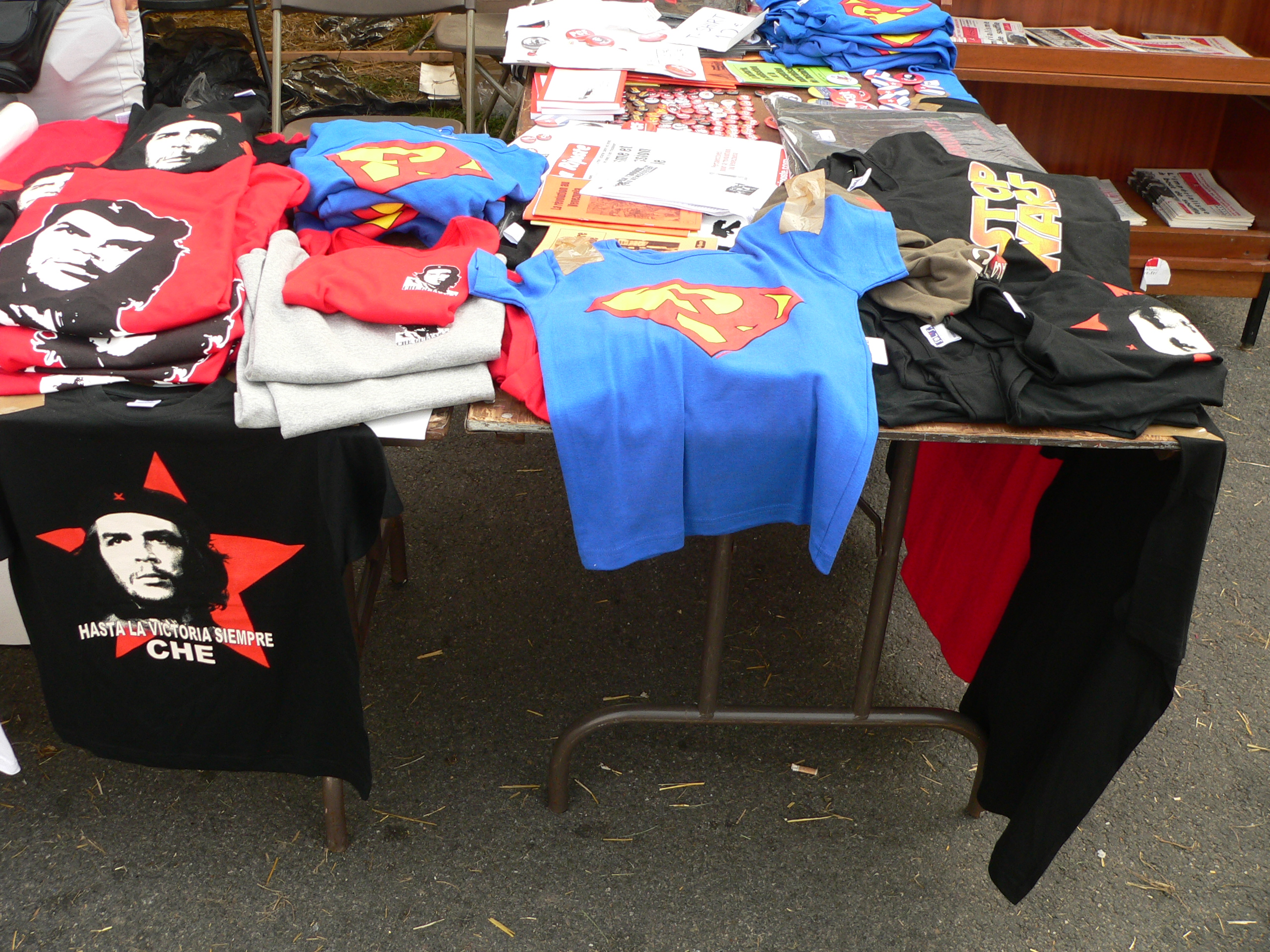 Fête de l’Humanité, 15 July 2006-17 July 2006